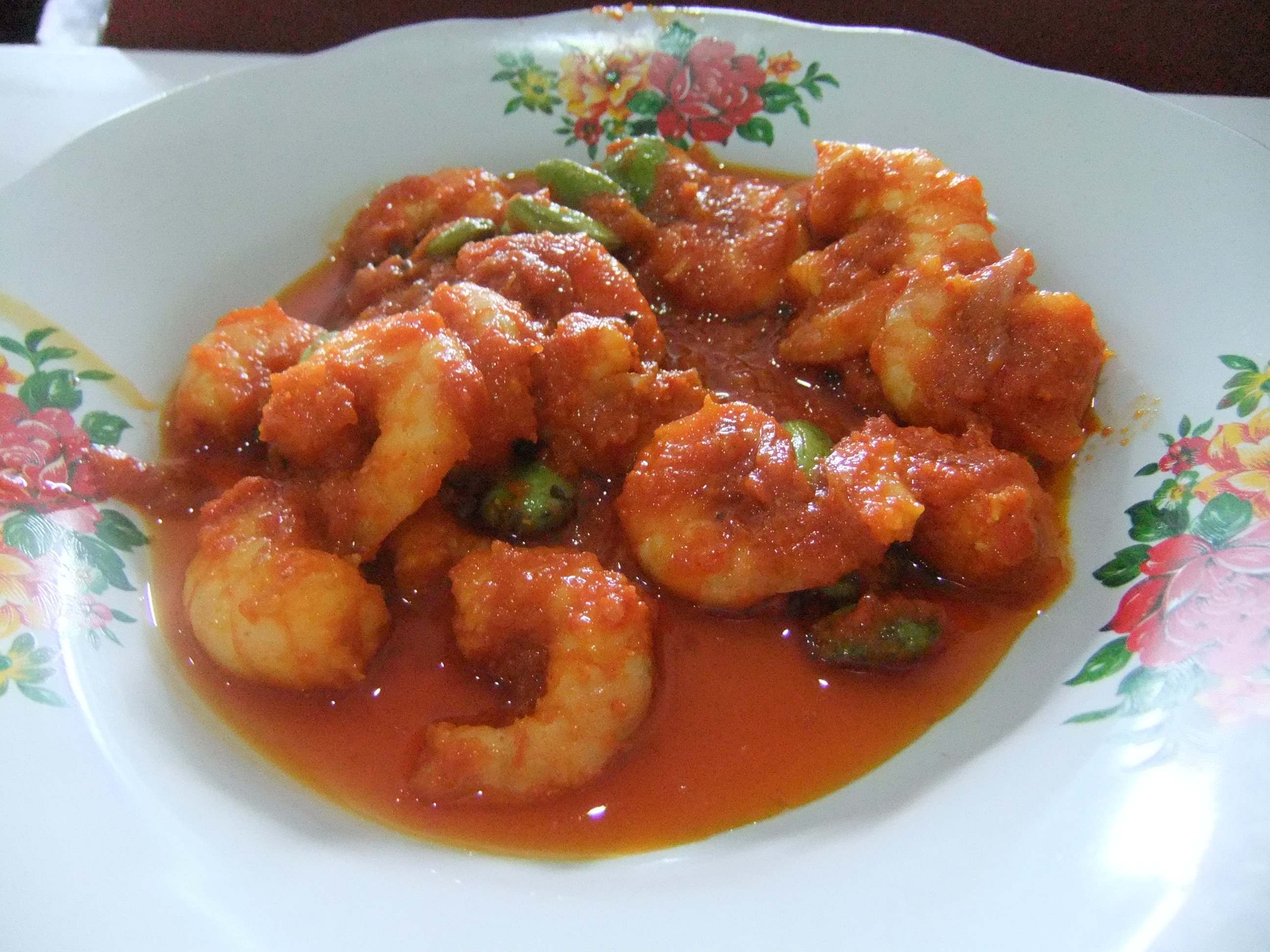 Sambal goreng udang